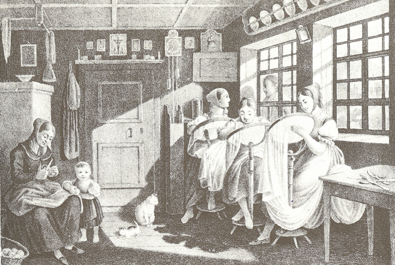 Stickerinnen in einer Appenzeller Wohnstube, um 1830